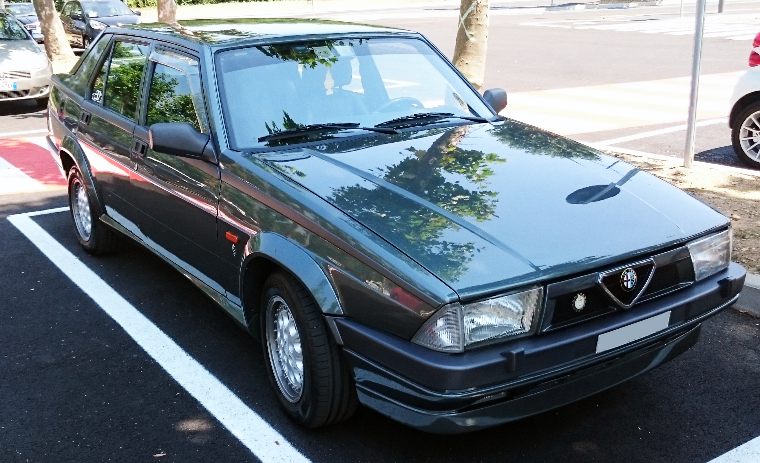 Vetture parcheggiate all'esterno del Museo Storico Alfa Romeo di Arese (Milano): Alfa 75